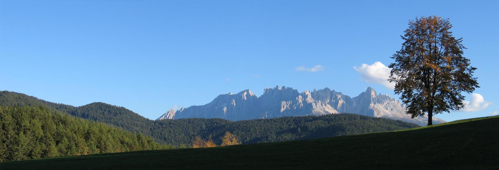 Latemar von Sternwarte Max Valier in Gummer